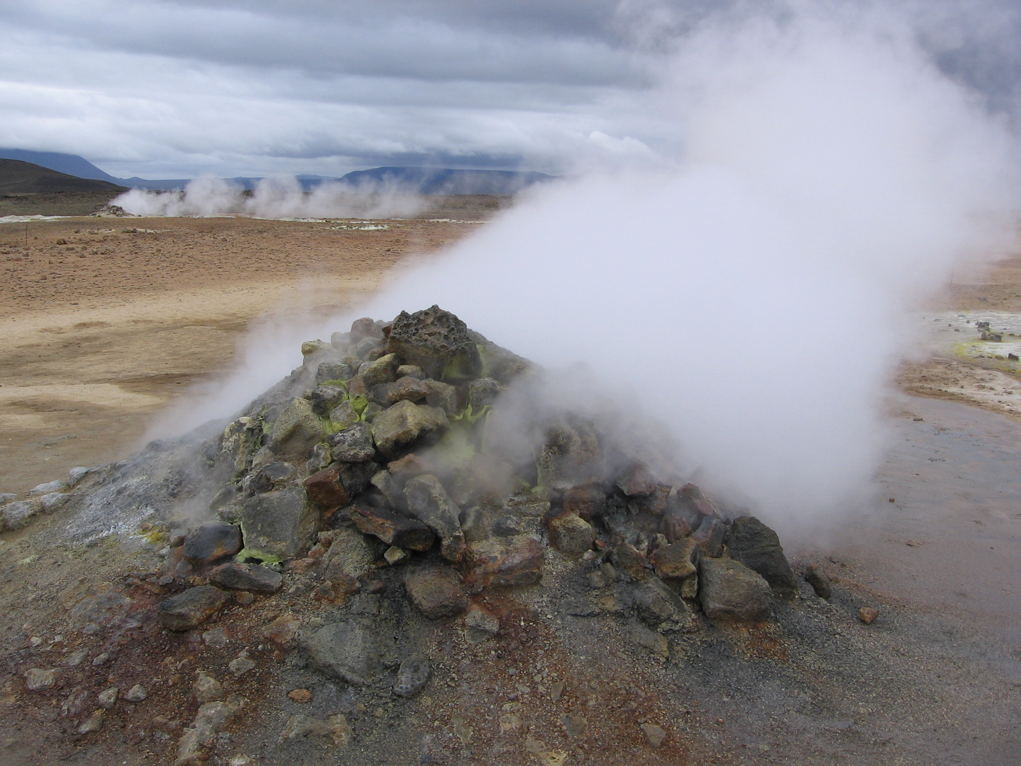 Solfatara near the volcano Krafla in Iceland